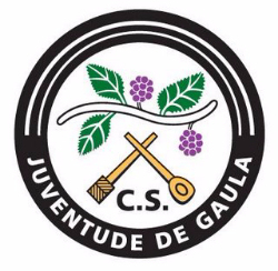 Símbolo do Clube